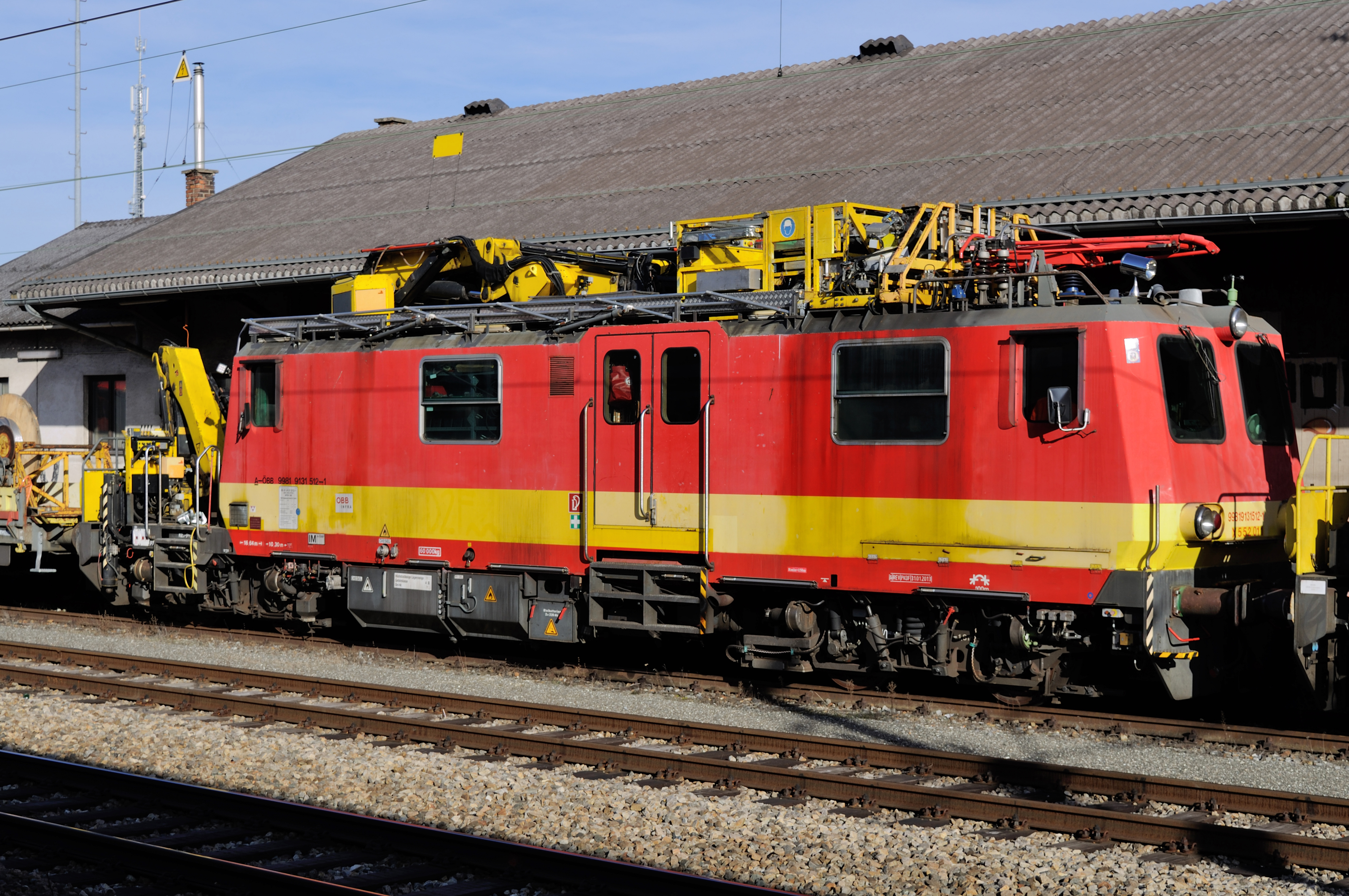 Motorturmwagen X 552.011 am Bahnhof Wien Liesing.